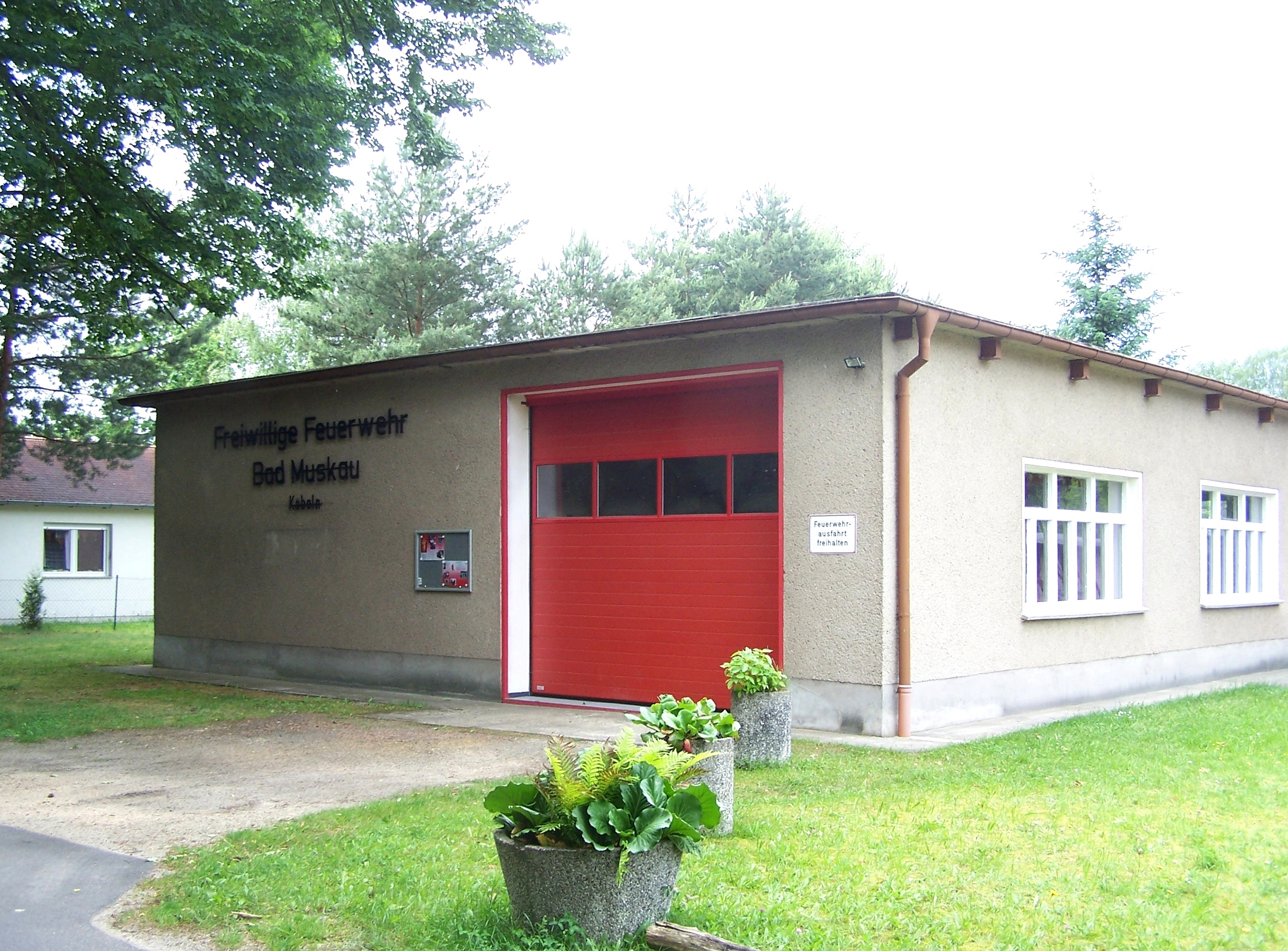 Freiwillige Feuerwehr in Köbeln, Bad Muskau, Landkreis Görlitz